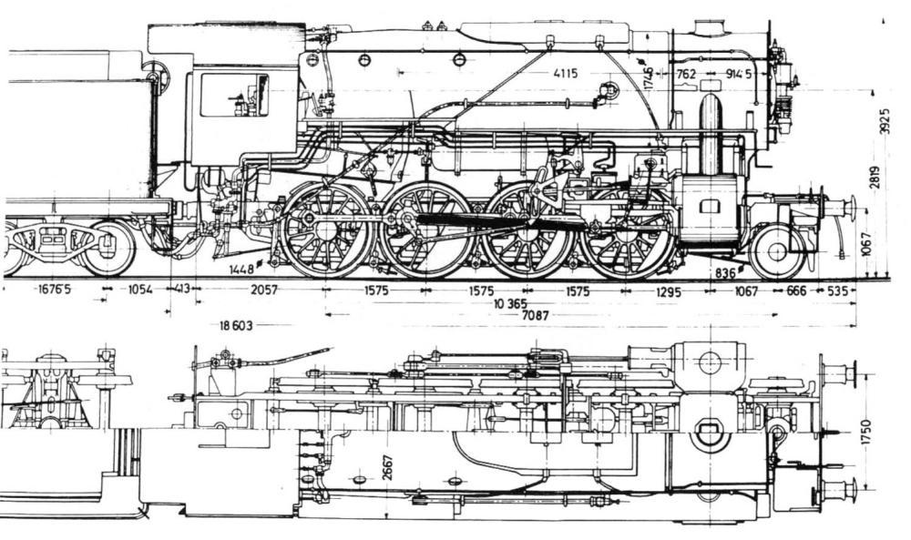 Máv 411